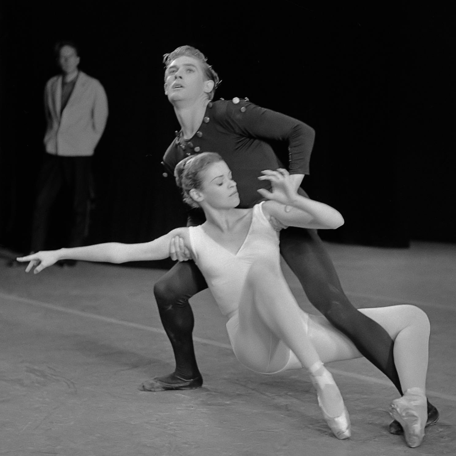 New York City Ballet in Amsterdam, Patricia Neary en Conrad Ludlow 26 augustus 1965